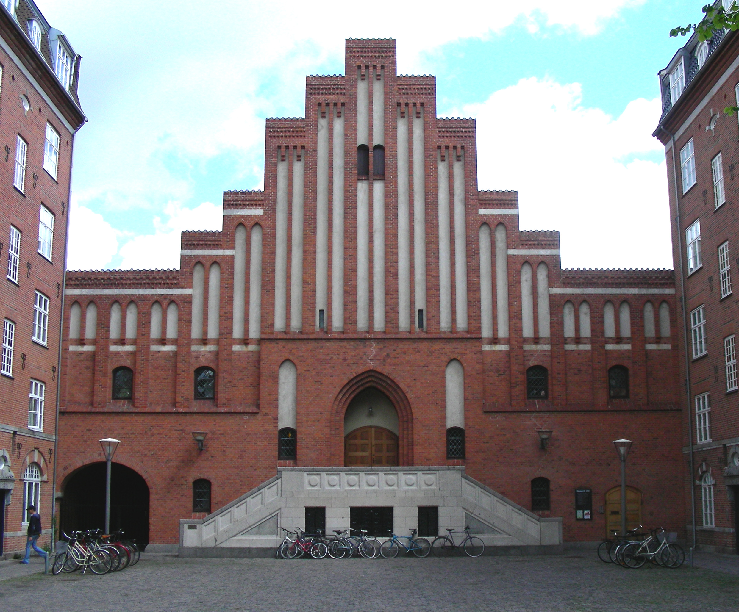 Blågårds Kirke, Copenhagen, Denmark. Front.